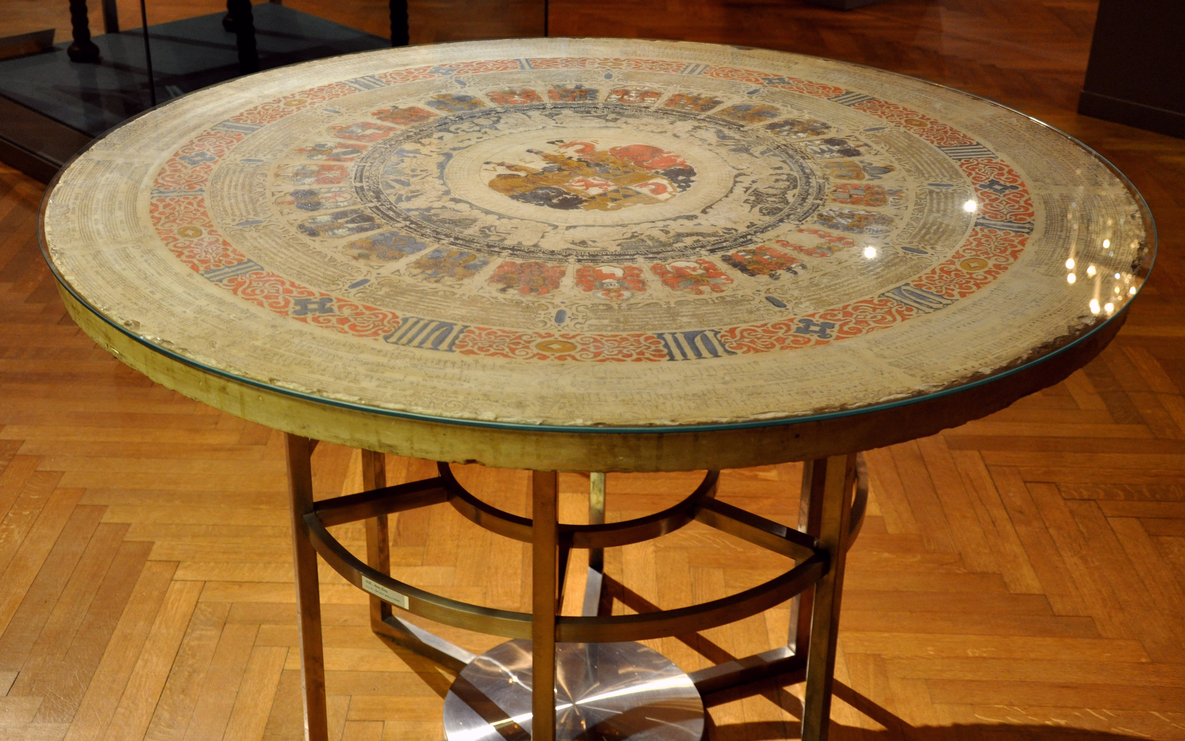 Passauer Liedertisch, 1590; Sammlung alter Musikinstrumente (in der Neuen Burg), Kunsthistorisches Museum, Wien